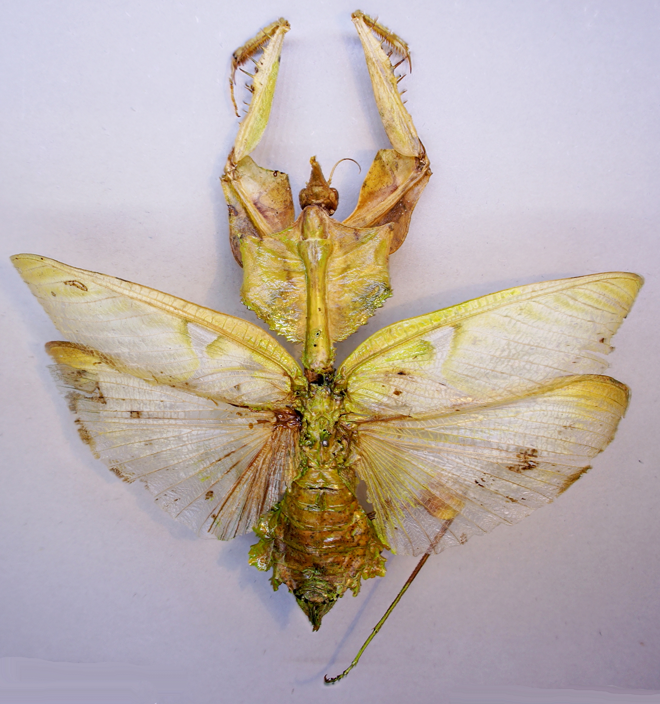 Idolomantis diabolica (Saussure, 1869) ♀ Herkunft: Ost-Afrika